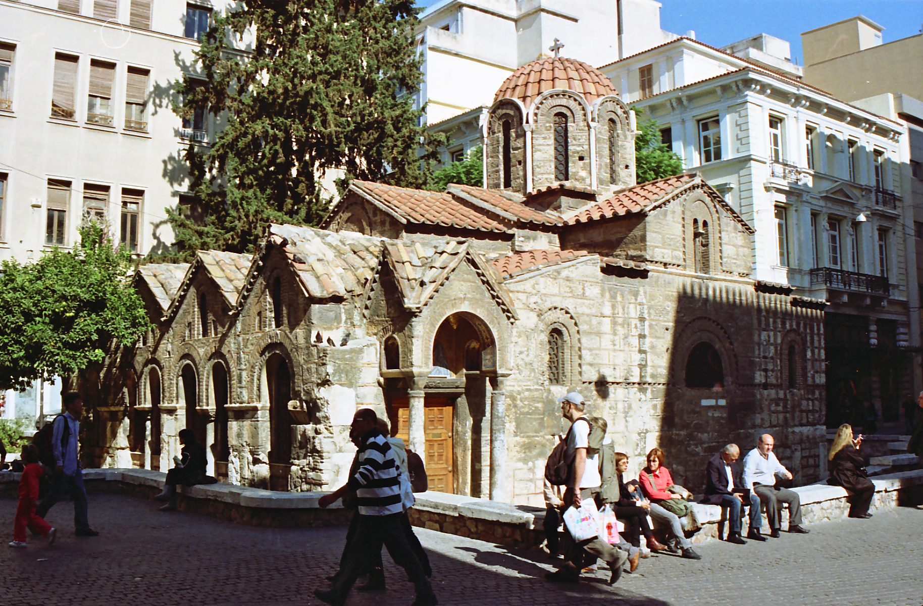 Καπνικαρέα«Καπνικαρέα»